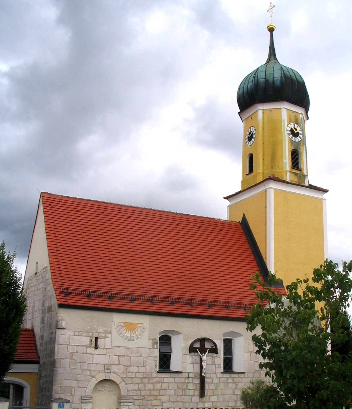 Kirche St. Andreas in Geibenstetten Ortsteil von Neustadt an der Donau